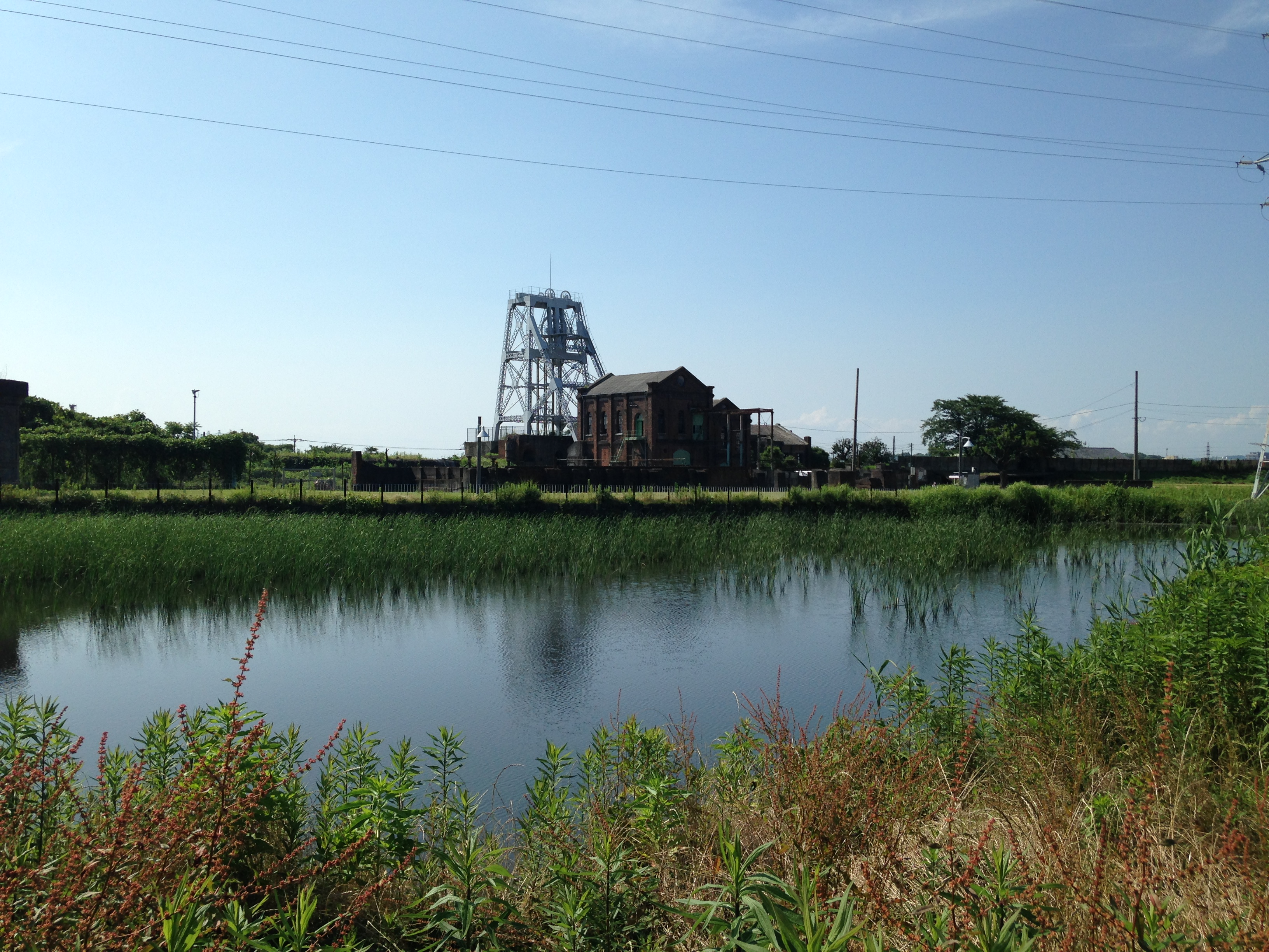 三井三池炭鉱万田坑の沈殿池と第二竪坑櫓・巻揚機室